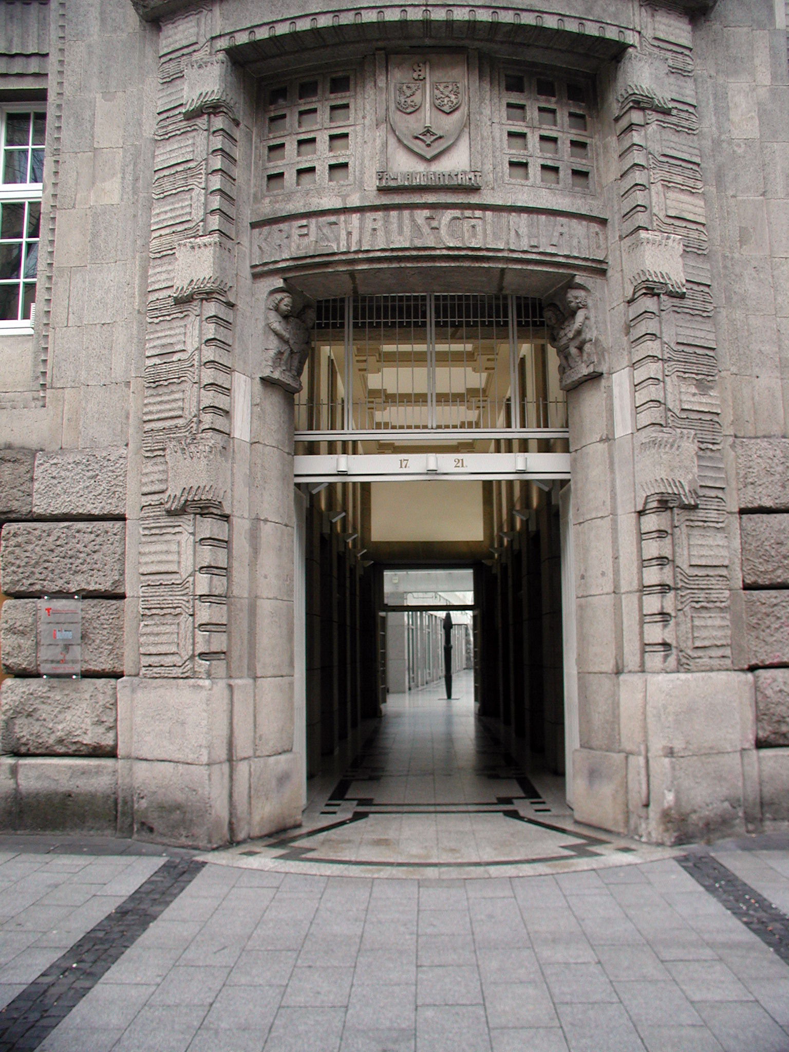 Kreishaus Köln, St.-Apern-Straße; Portal mit Wappen des Landkreises Köln